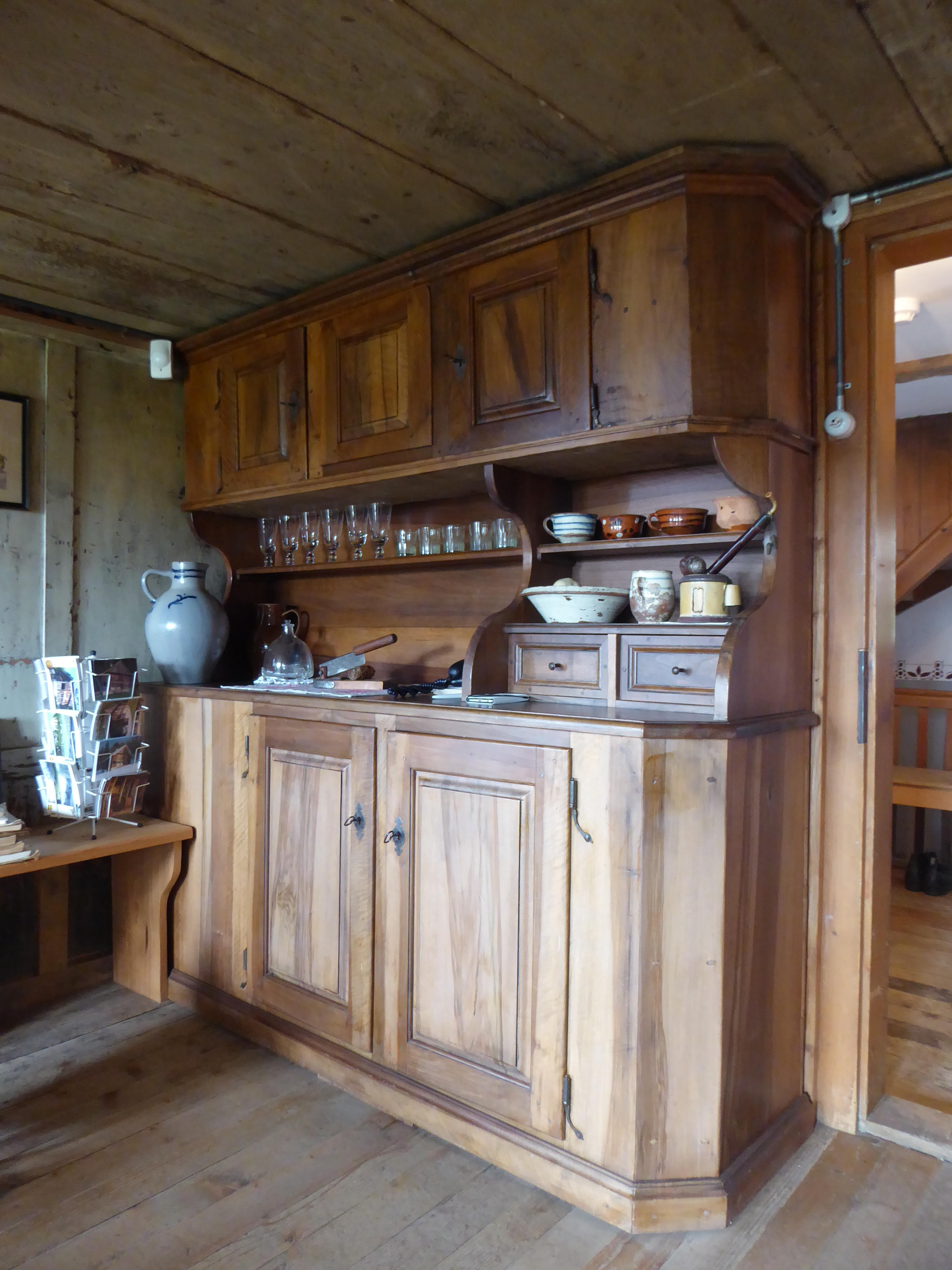 Biedermann-Haus Schellenberg: Einbaubuffet in der Stube